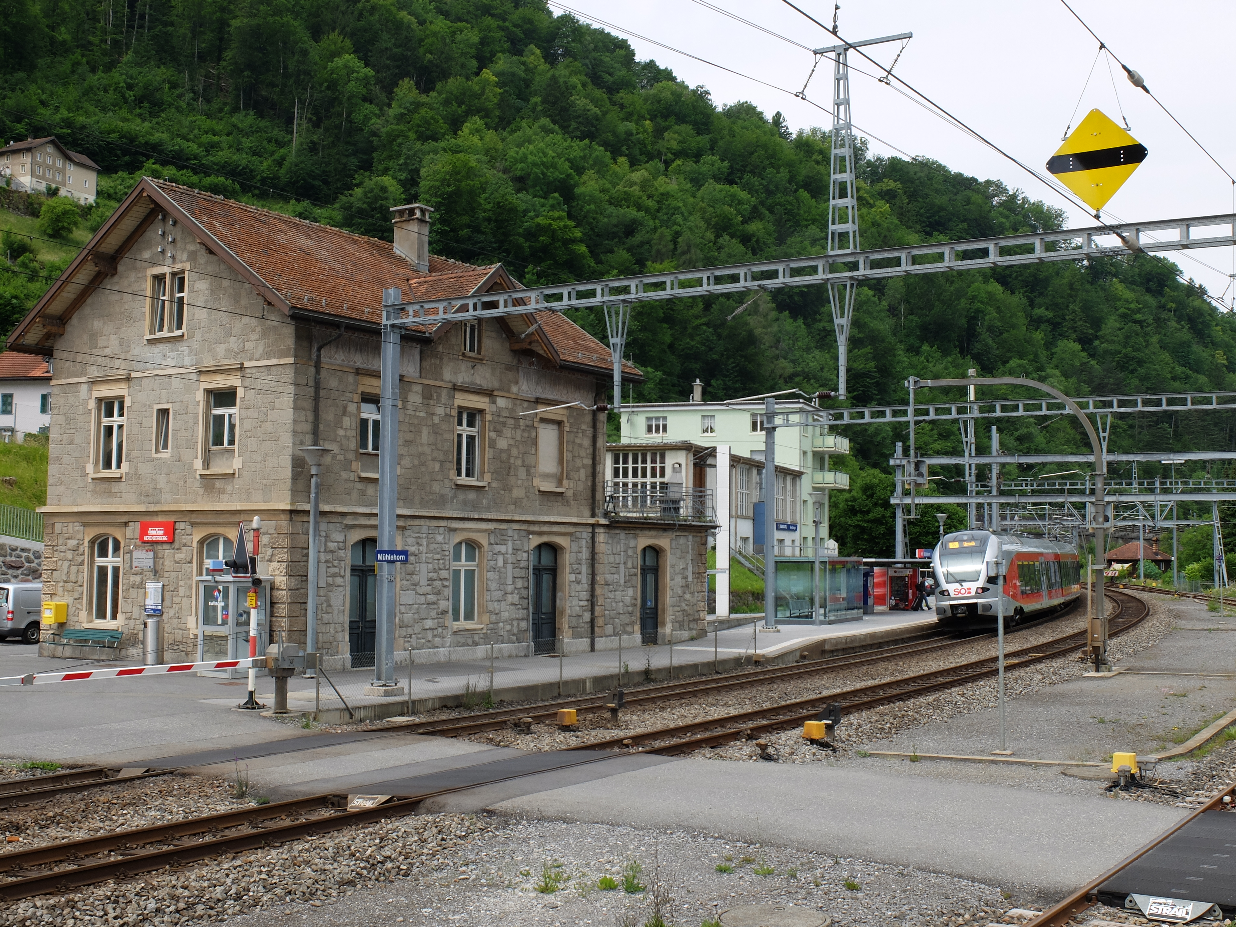 Bahnhof Mühlehorn mit S 4